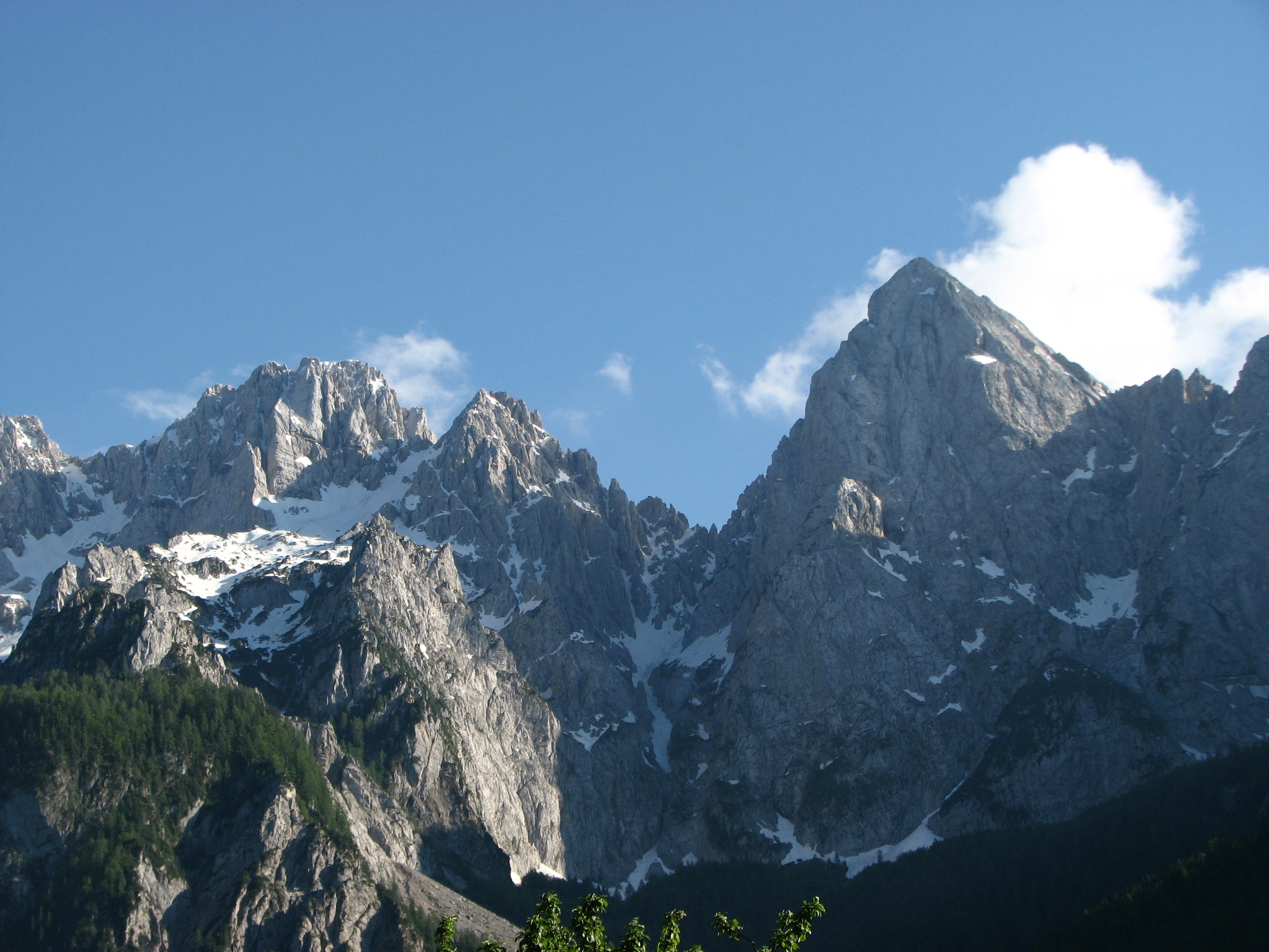 Martuljška skupina: Velika (2602 m) in Mala Martuljška Ponca (2502 m) in Špik 2497 m), Julijske Alpe, Slovenija